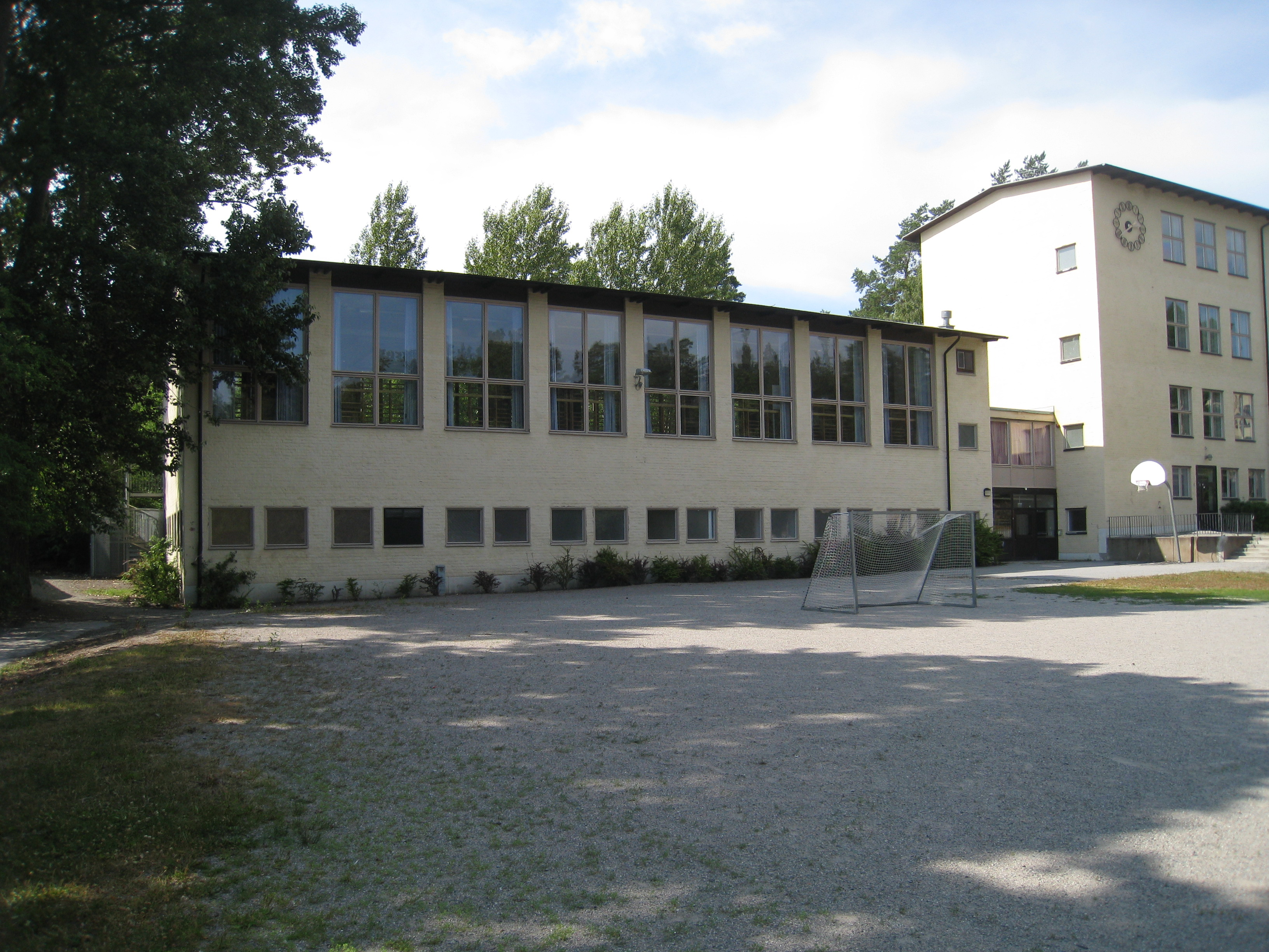 Äppelviksskolan, Alviksvägen 97, Bromma. Idrottsavdelningen tillkom 1942.